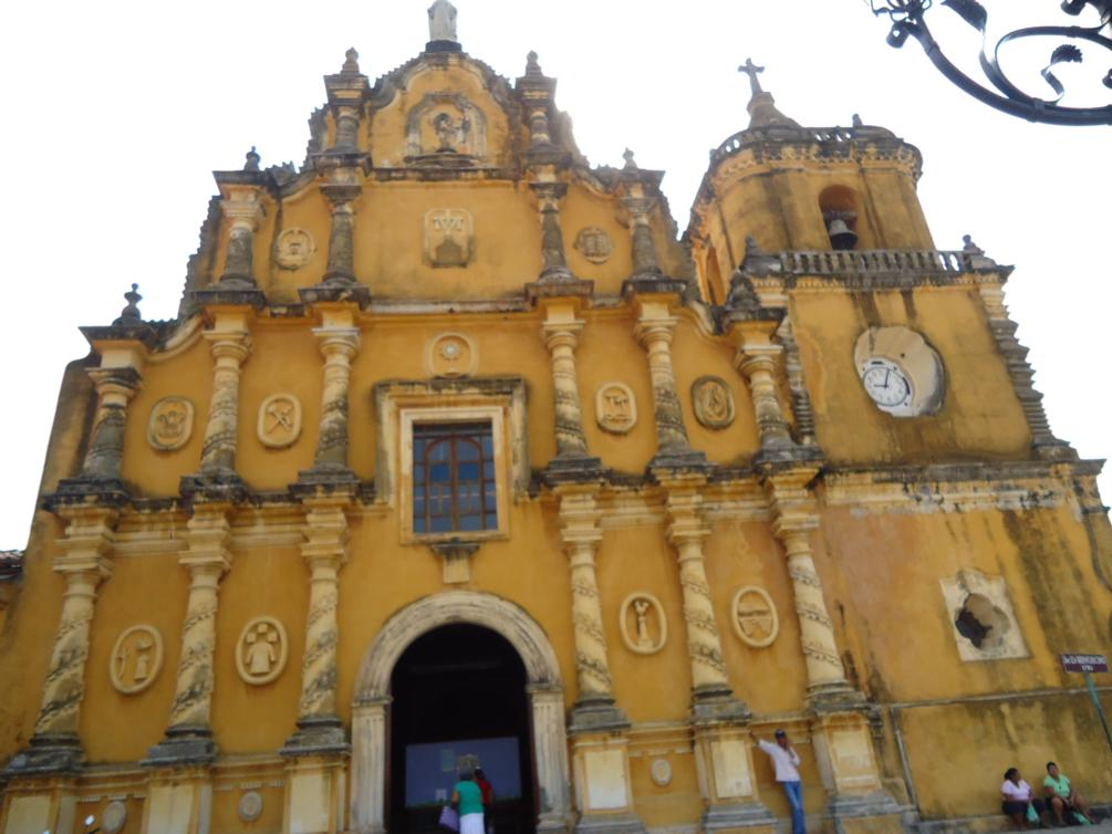 Recolección León, Nicaragua por Richard Weiss